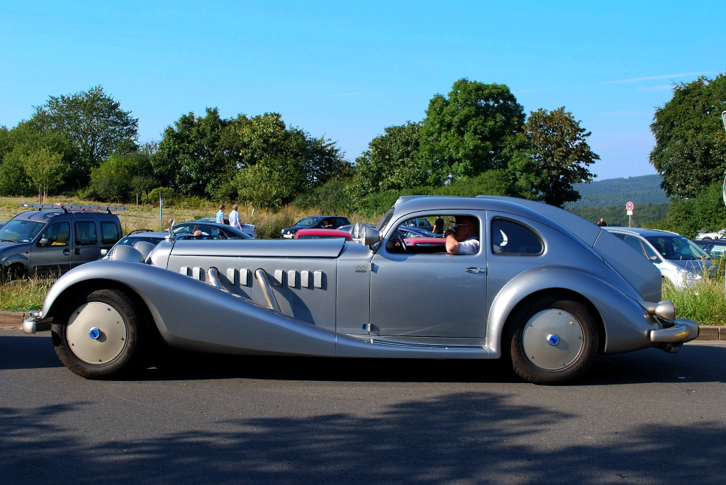 Der Autobahnkurier gesehen im Jahr 2009 an der Nordschleife.